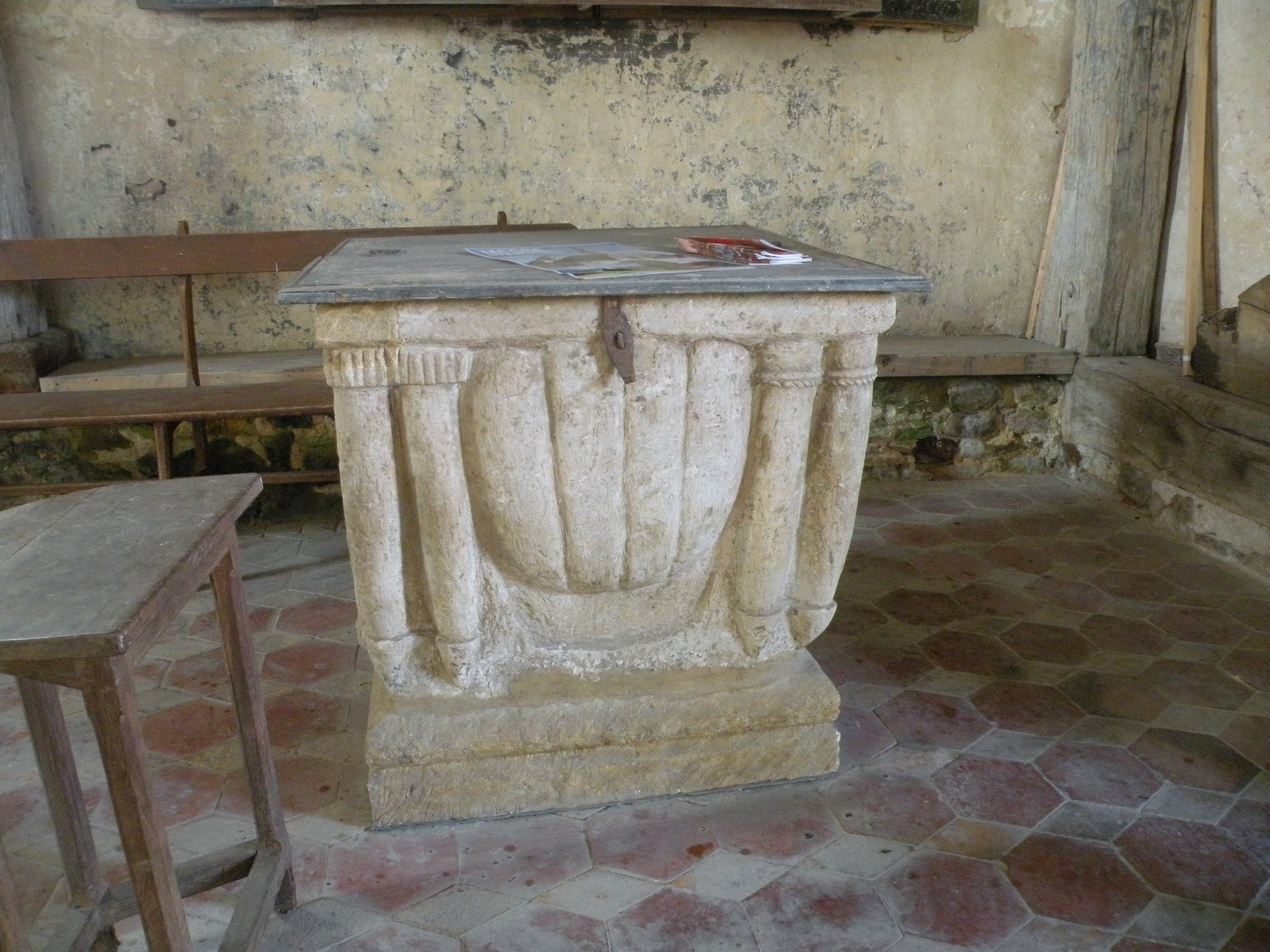 Intérieur de l'église Saint-Denis d'Hodenc-en-Bray